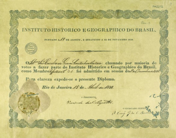 Diploma de sócio efetivo do Instituto Histórico e Geográfico do Brasil concedido a Eusébio de Queirós. Rio de Janeiro, 15 de abril de 1839. Arquivo Eusébio de Queirós.